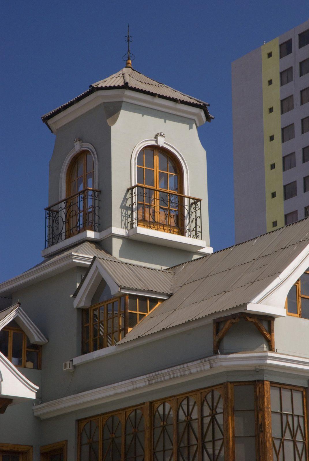 Torreón de la casa Camus.